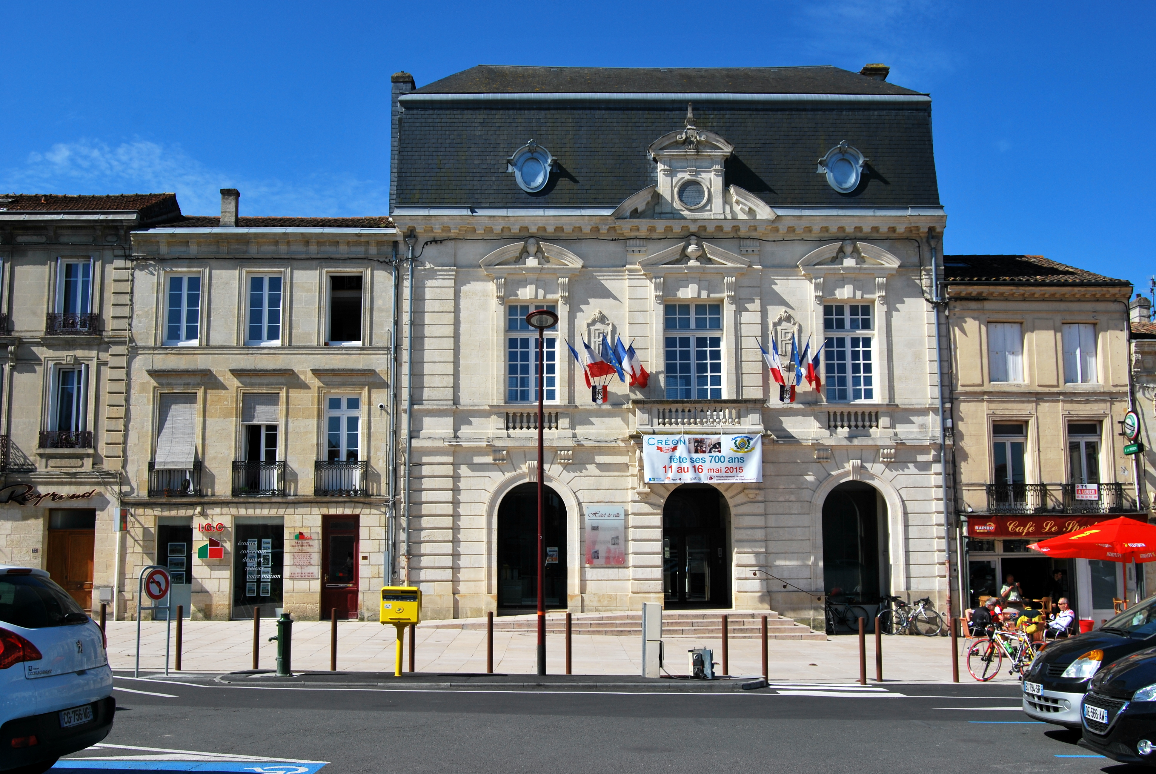 Mairie Créon